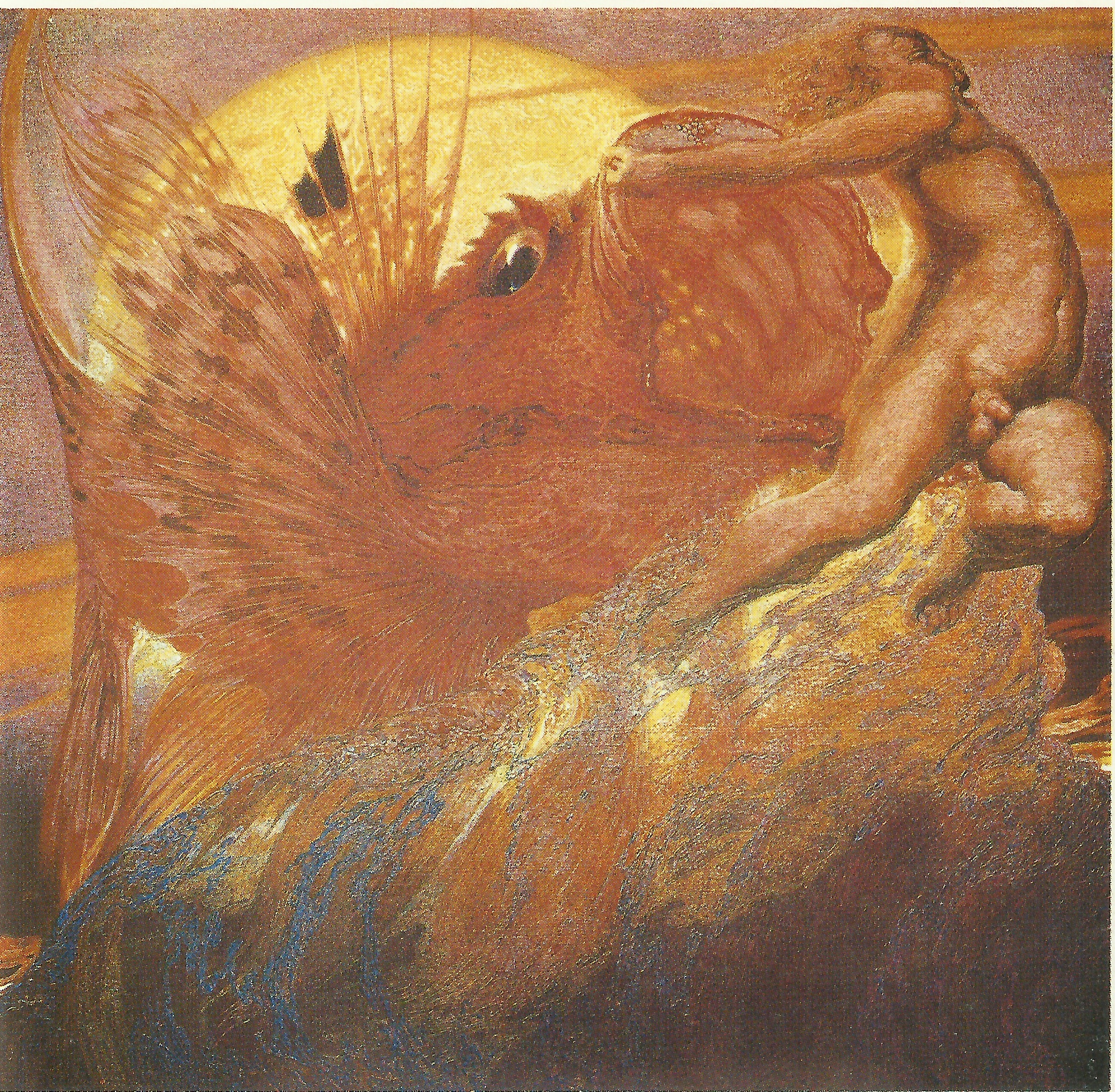 9.Poema del Mar / Tarde, 1913-1924, óleo sobre lienzo, 126 x 126 cm. (Museo Néstor).